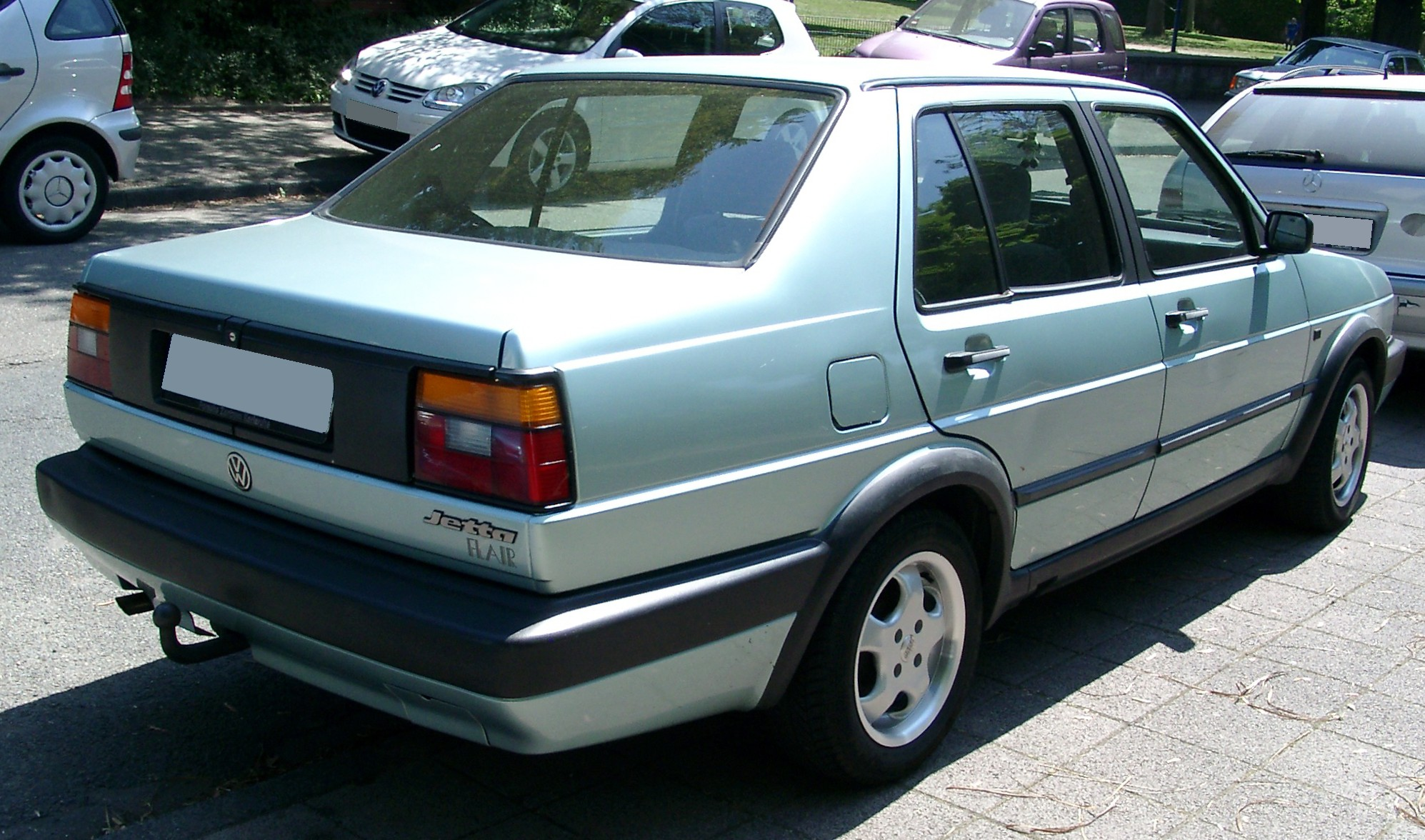 VW Jetta